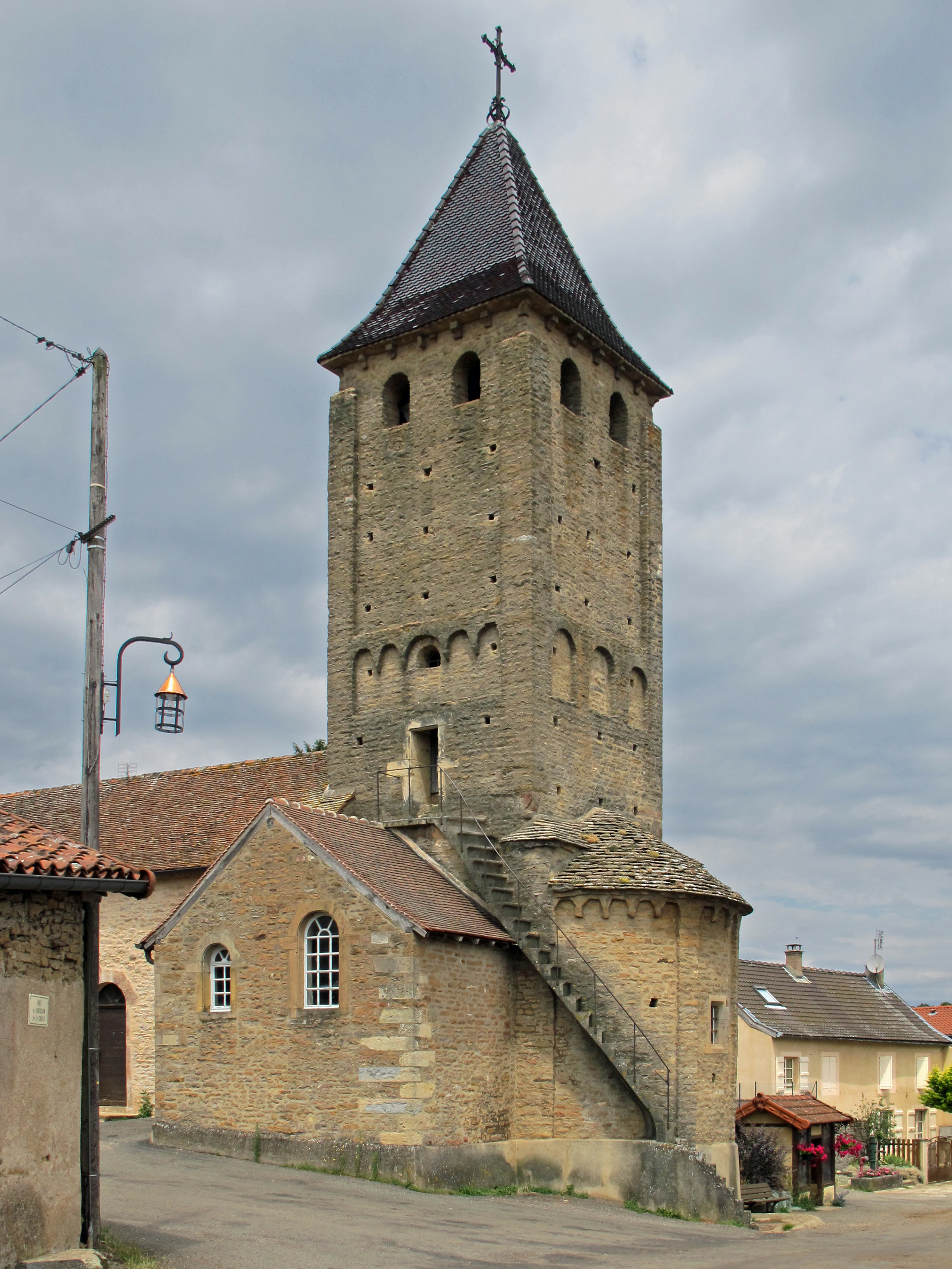 L'église paroissiale Saint-Julien est de style roman (XIème siècle). The parish church of Saint-Julien is Romanesque (XI century).